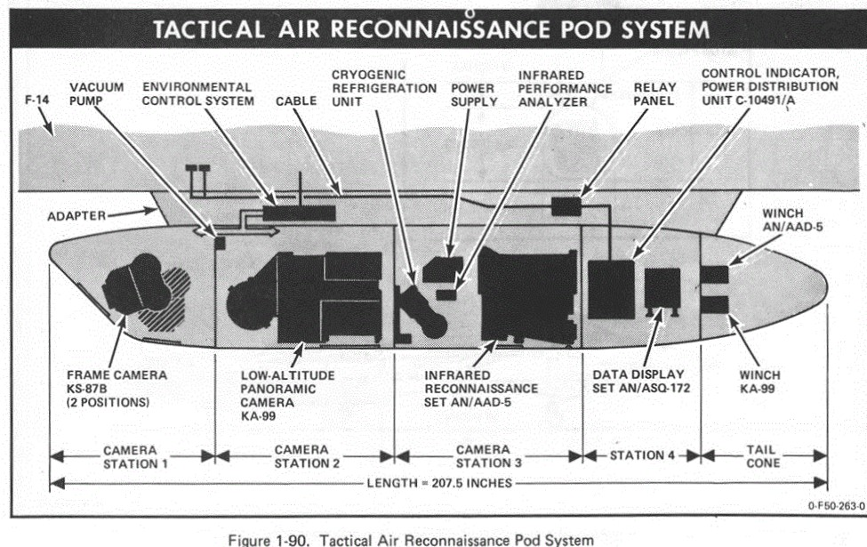 Coupe d'une nacelle de reconnaissance TARPS de première génération.